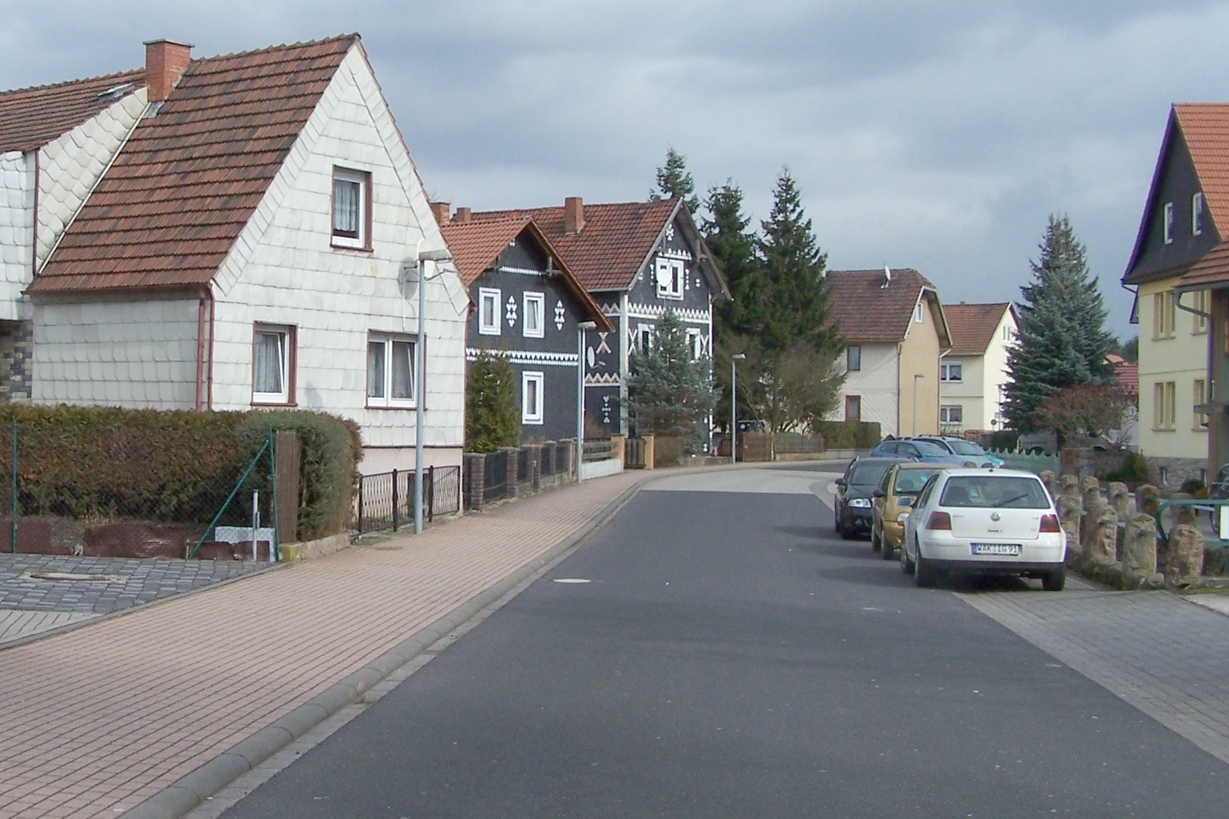 Leimbach im Wartburgkreis, verschiedene Geb�ude und Ansichten.